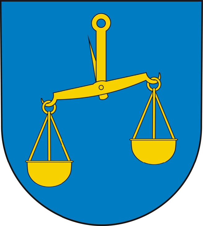 Herb gminy Gaworzyce